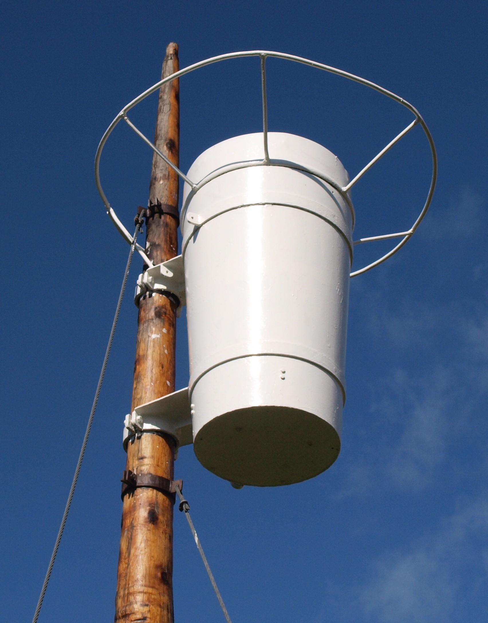 Norsk (nynorsk): Tønne frå fangsfartøy montert i ei mast på eit museum